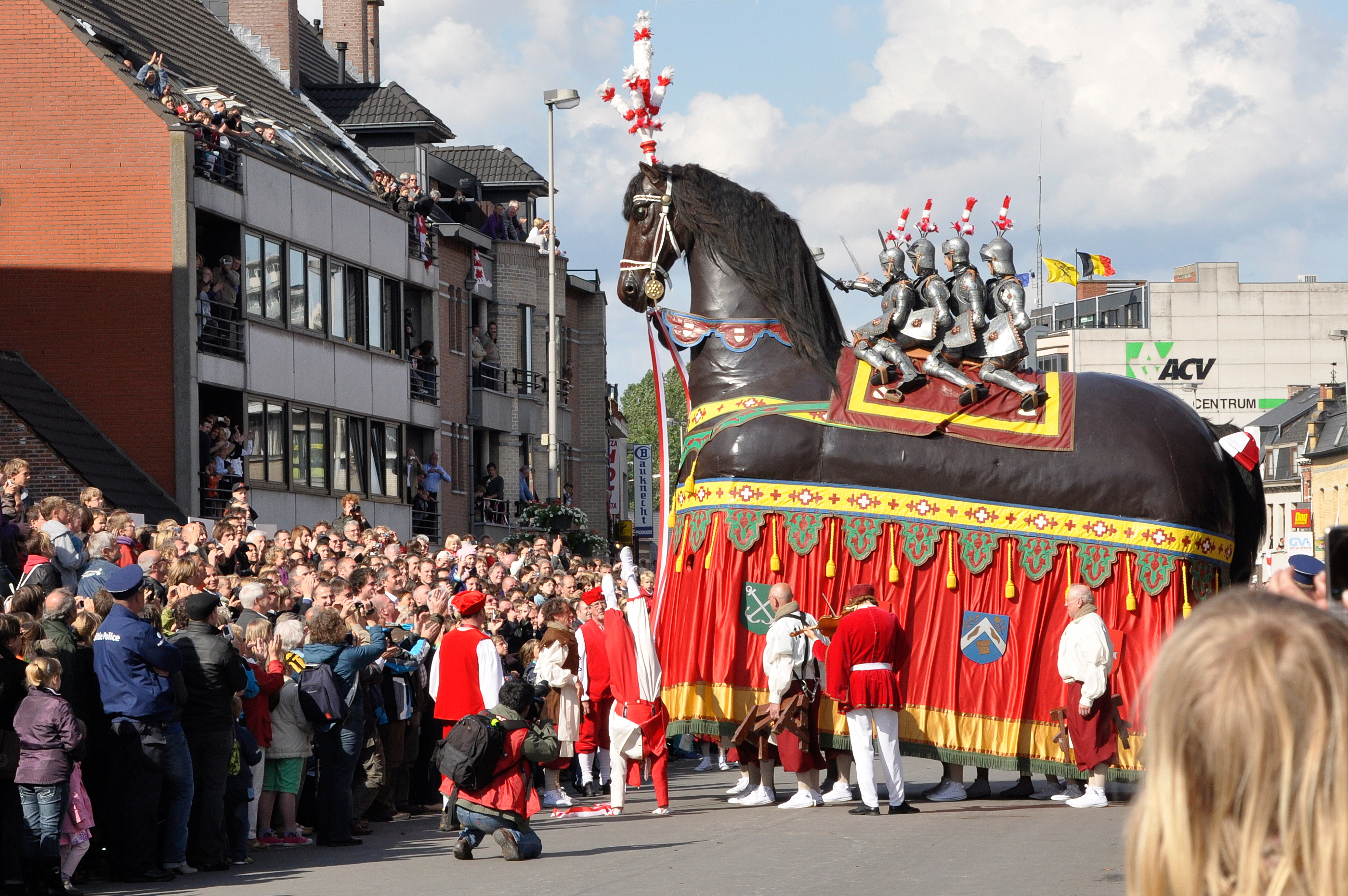 Het Ros Beiaard te Dendermonde editie 2010 met de gebroeders Van Damme